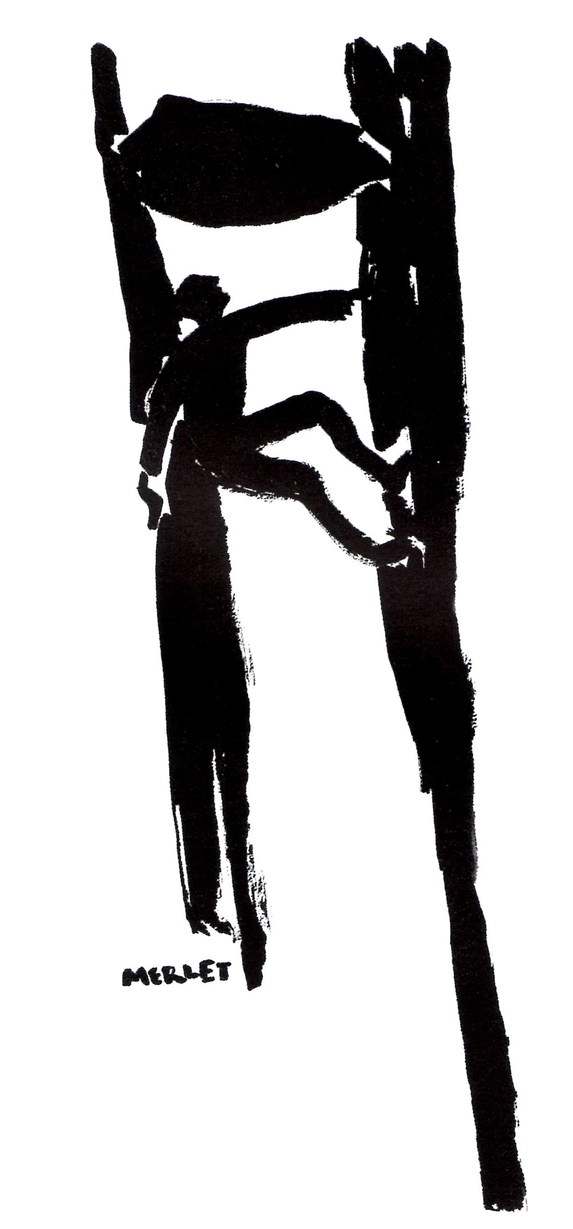 Der eingeklemmte Felsen